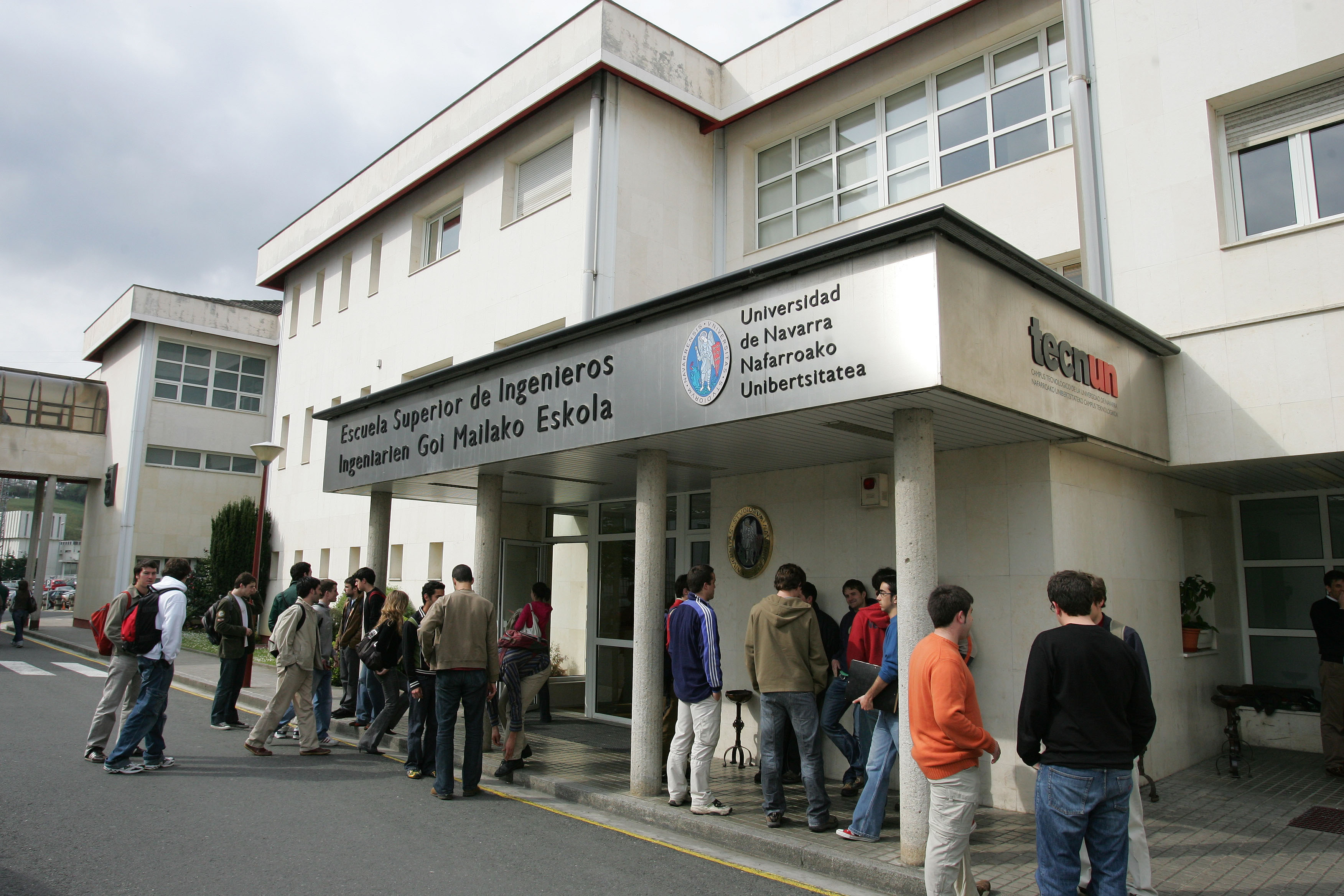 Escuela Superior de Ingenieros. Universidad de Navarra. Campus de Ibaeta (San Sebastián)